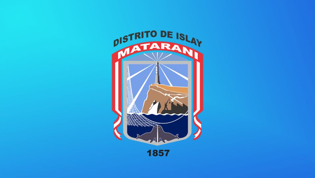 Bandera del Distrito de Islay - MDI